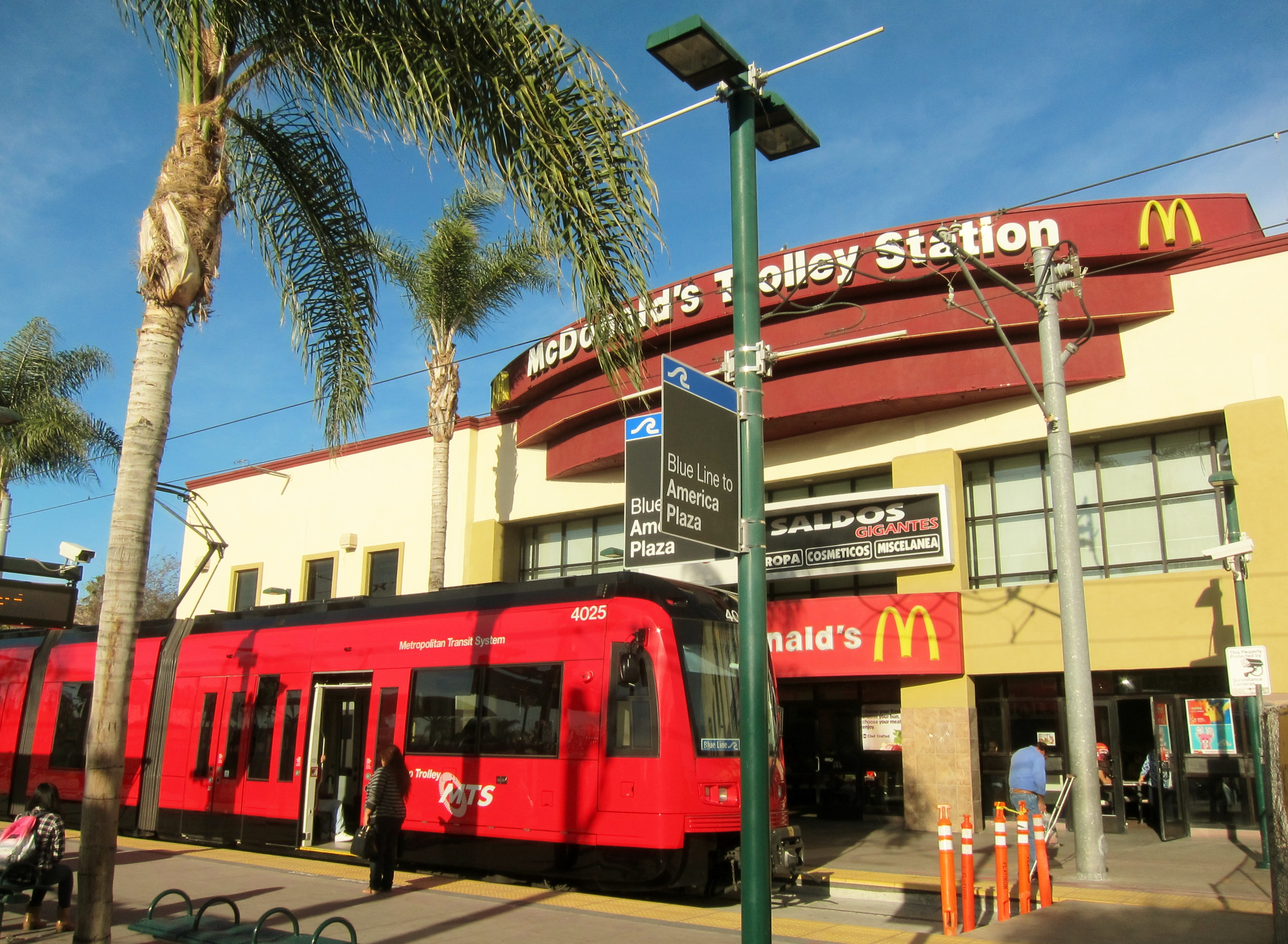 San Ysidro, San Diego, CA, USA